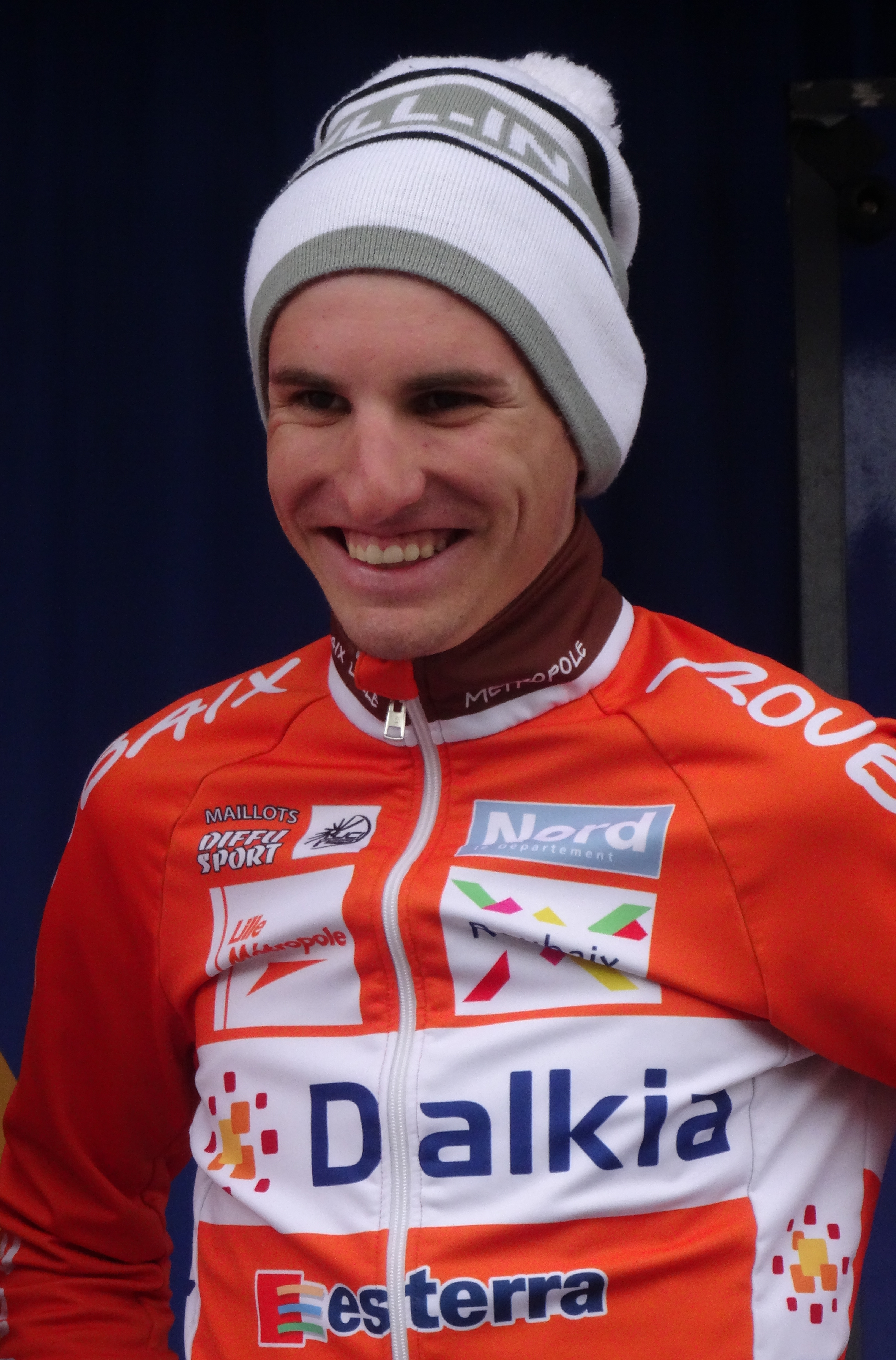 Reportage photographique réalisé le jeudi 8 mai 2014 au départ de la deuxième étape de l'édition 2014 des Quatre jours de Dunkerque à Hazebrouck, Nord, Nord-Pas-de-Calais, France. Depicted person: Quentin Jauregui Depicted team: Roubaix Lille Métropole